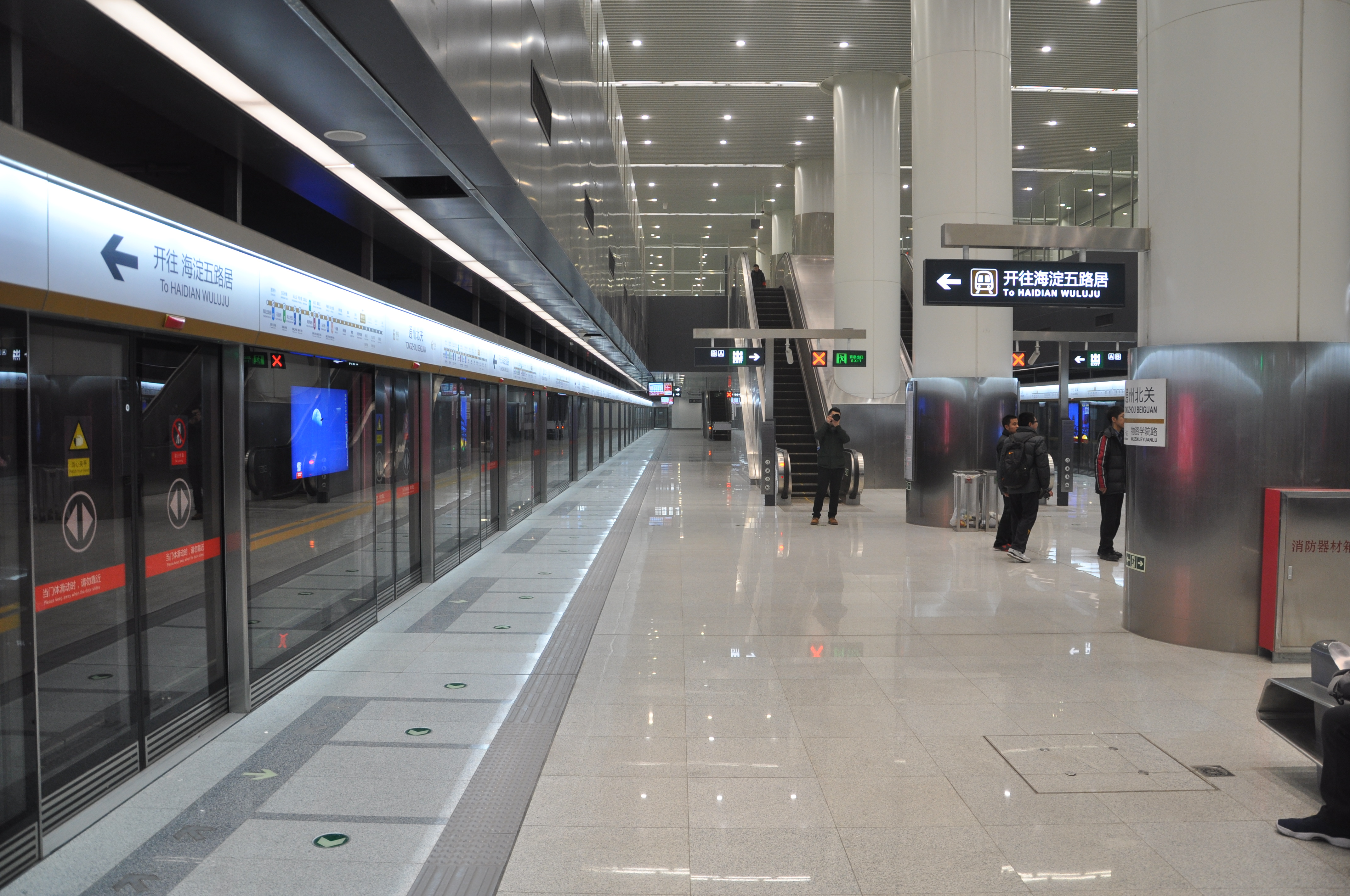 北京地铁6号线通州北关站站台，上方没有站厅层楼板，可见车站顶棚。